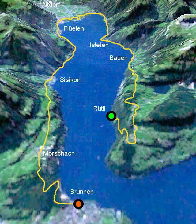 Parcours de la Voie Suisse